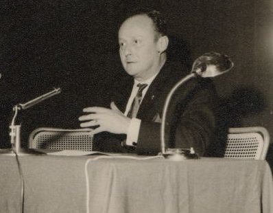 Roger Mucchielli